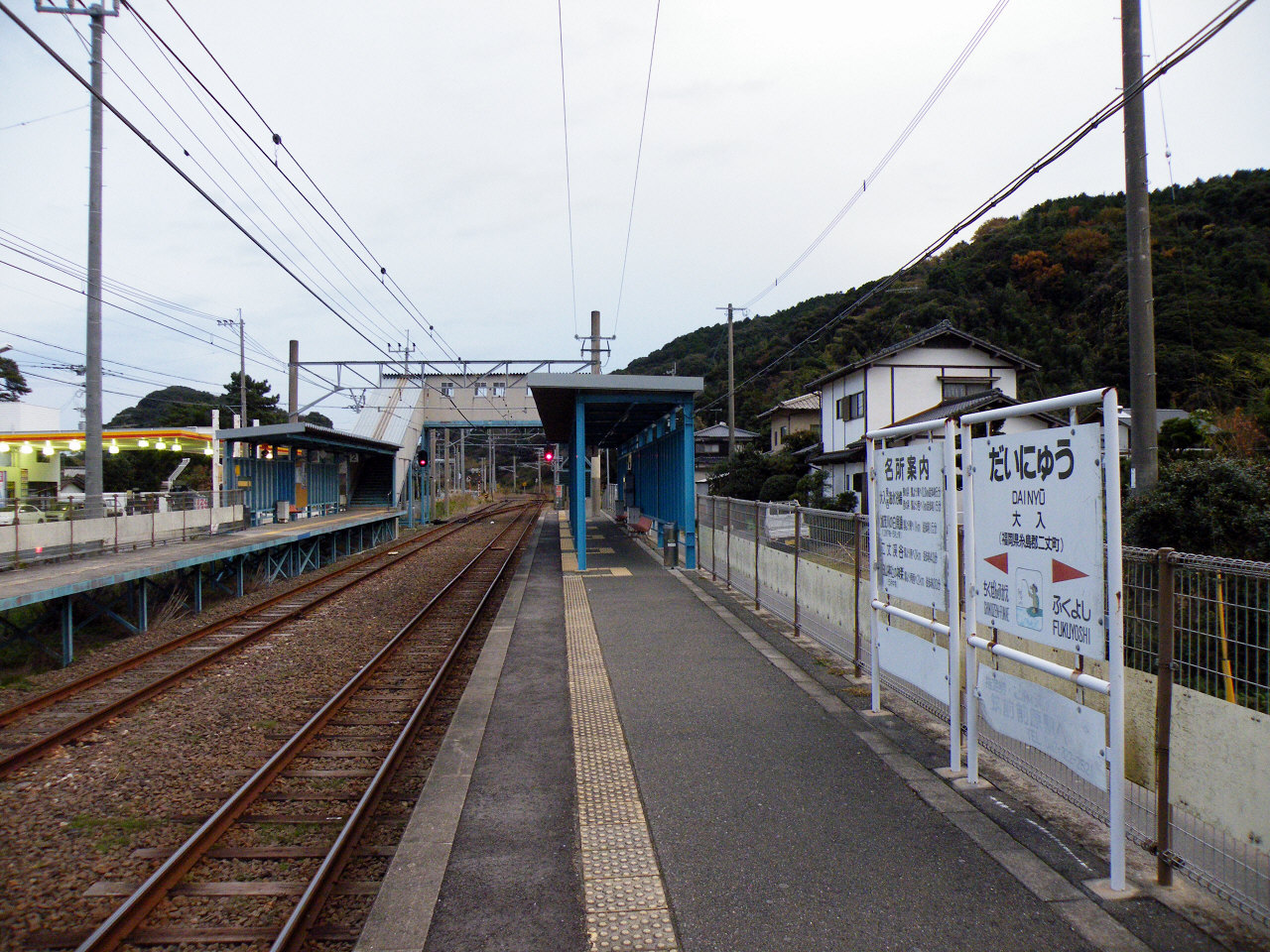 JR九州筑肥線大入駅（JRKyushu Chikuhi LIne Dainyu Station）